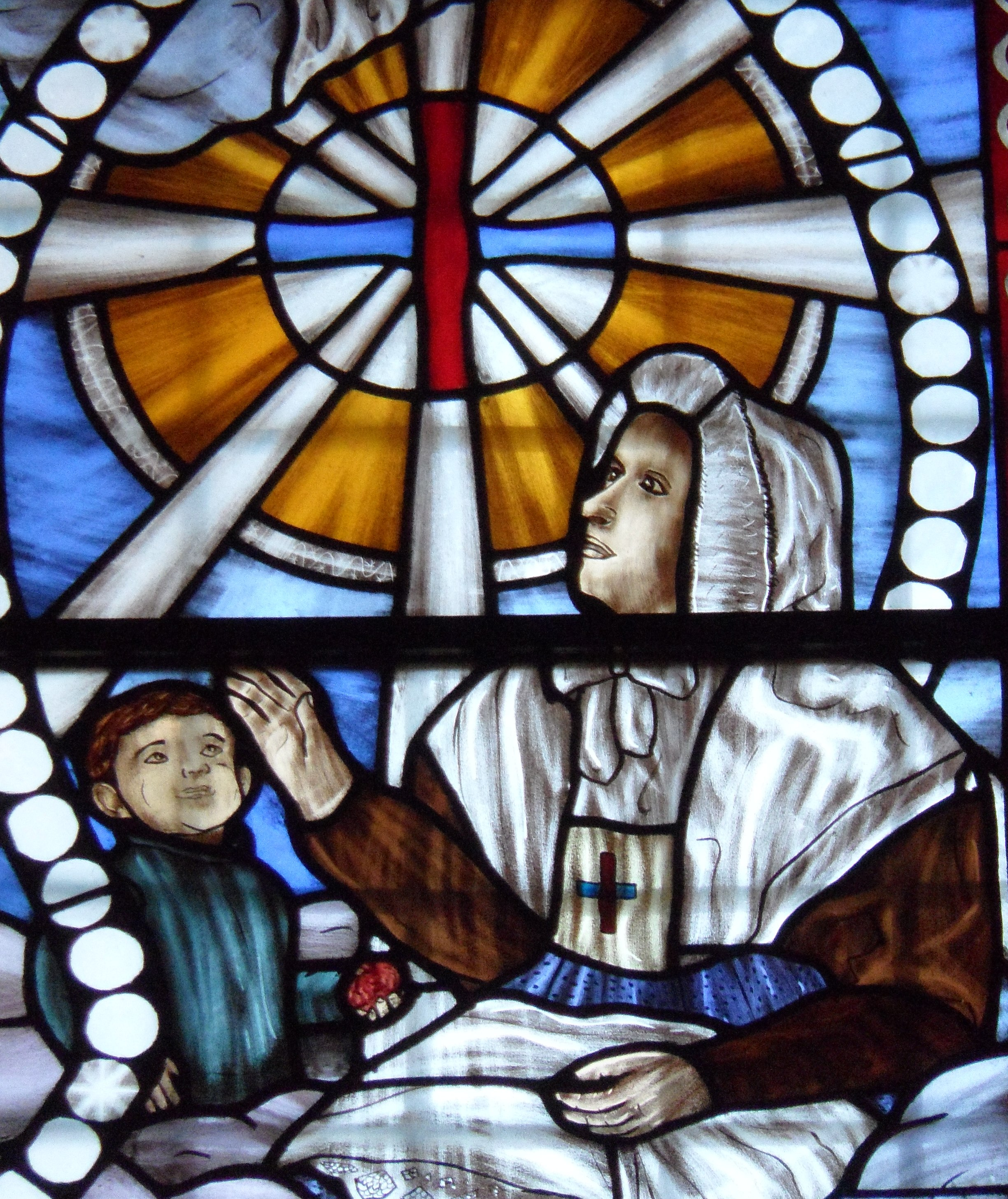 Particular de un vitral en la Iglesia de Santo Tomás in Formis de Roma.